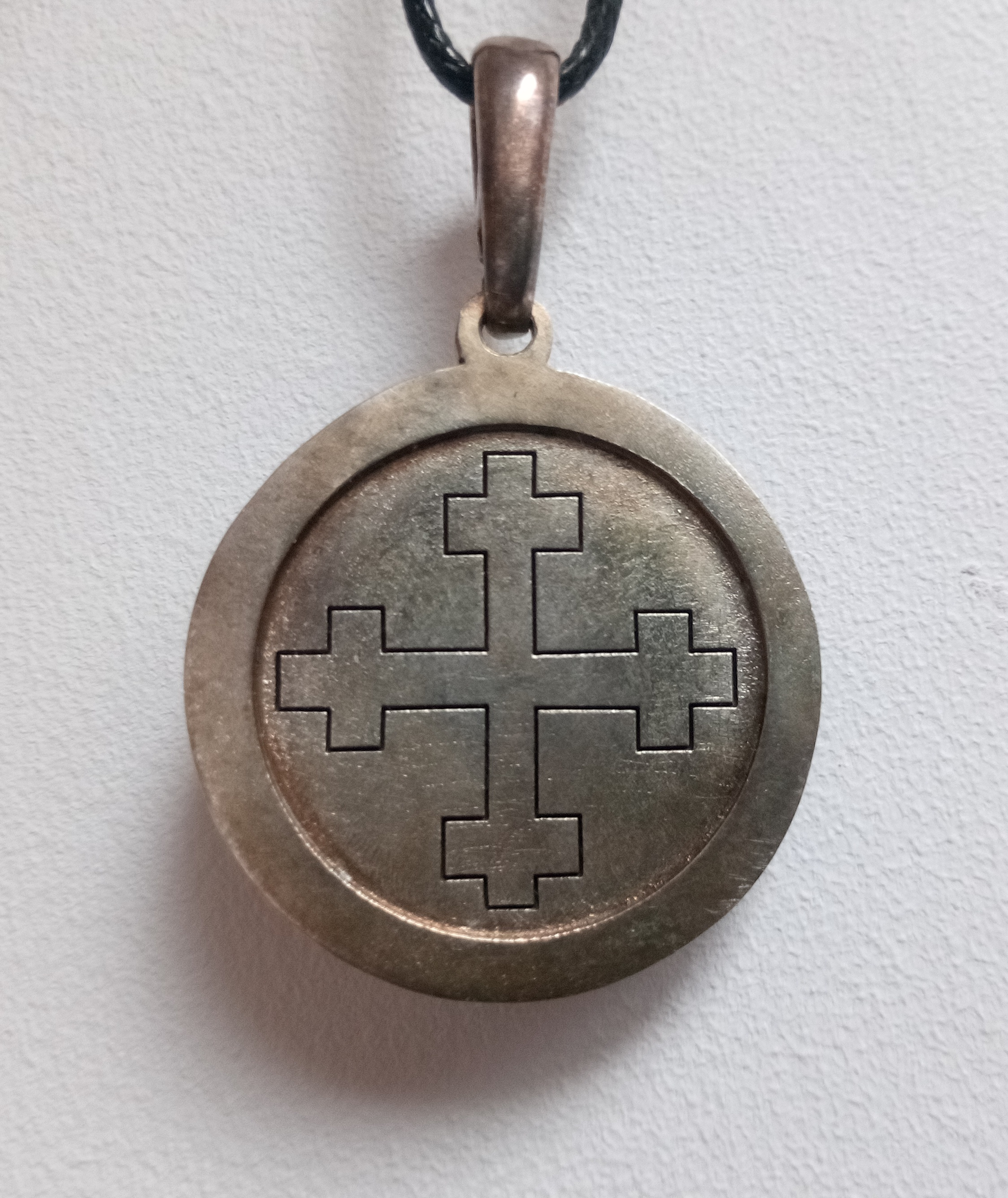 Падвеска Мары Шапецька-Дзічкоўскай. На падвеке крыж Мары (Мара, язычніцкае боства, якому пакланяліся продкі сучасных беларусаў).